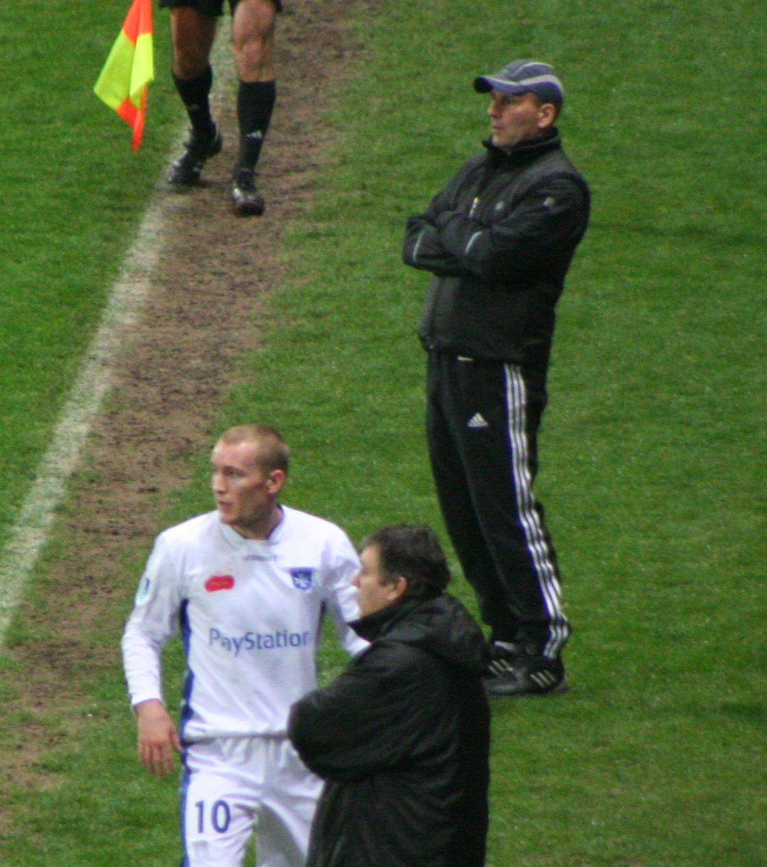 Jacques Santini (entraîneur de l'AJ Auxerre, au premier plan) avec Thomas Kahlenberg (n°10) - Élie Baup (entraîneur de Saint-Etienne, à l'arrière plan)